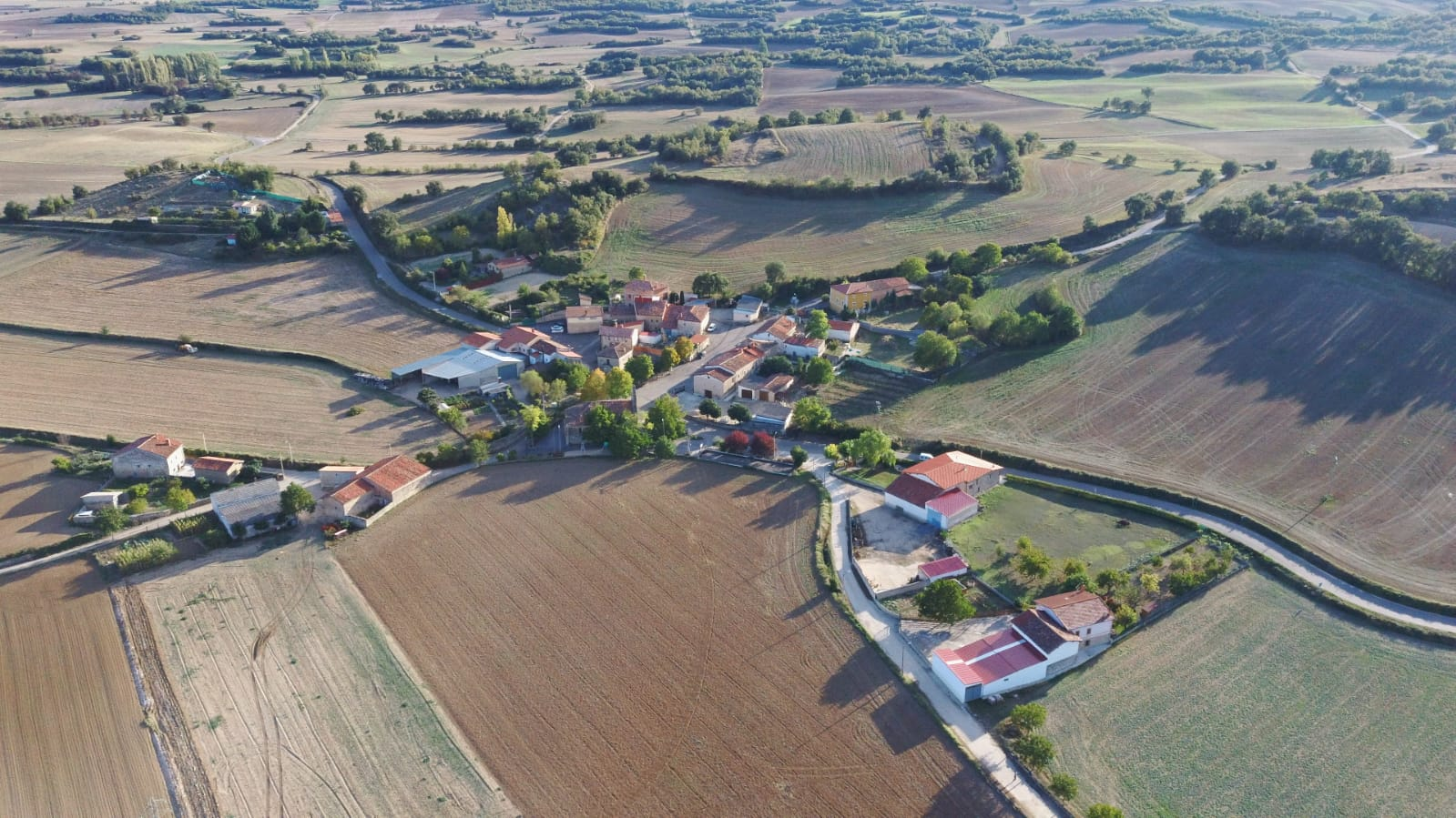 Foto Aerea